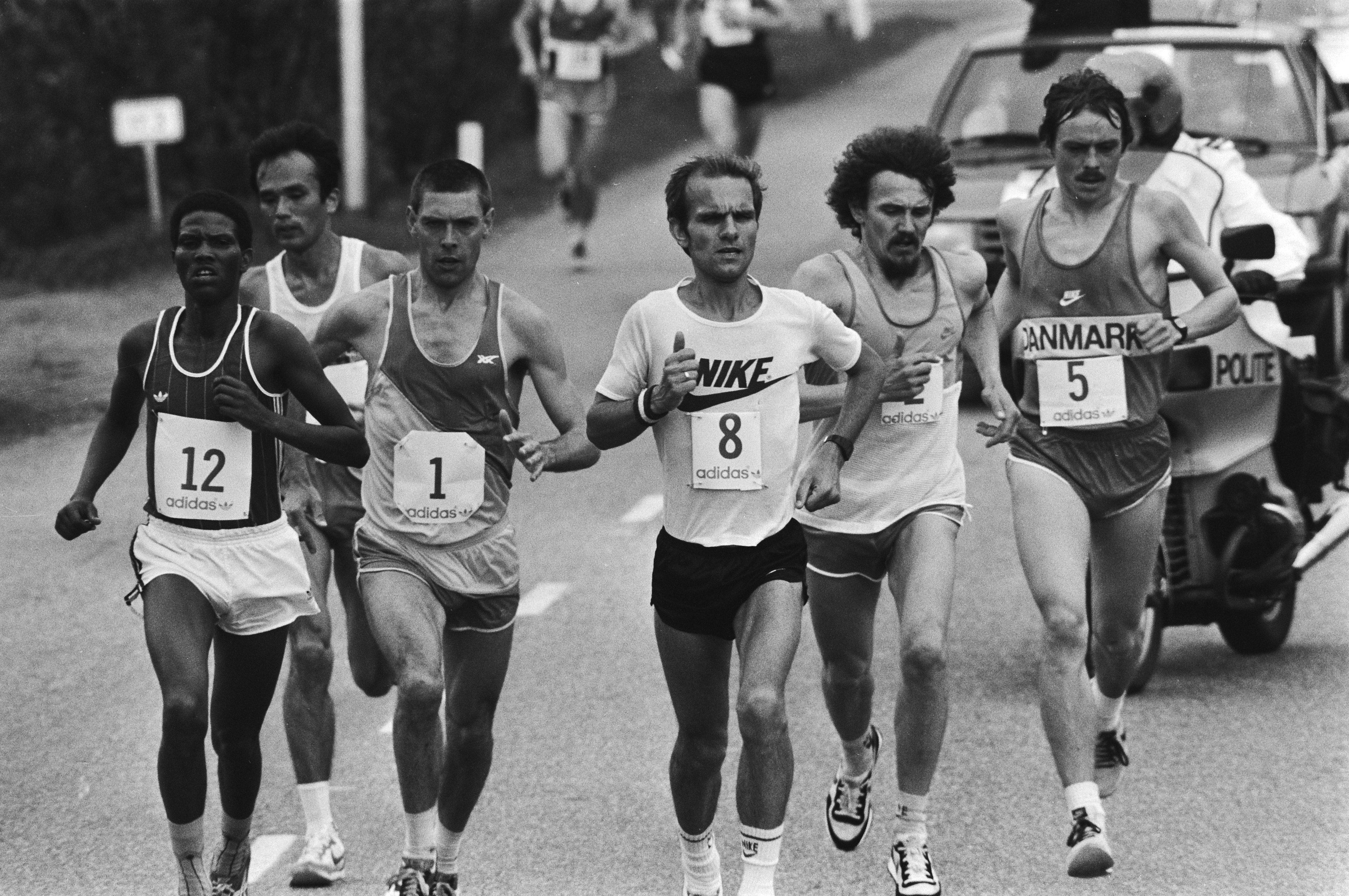 Collectie / Archief : Fotocollectie Anefo Reportage / Serie : Marathon 1983 van Amsterdam Beschrijving : marathon, hardlopen Datum : 7 mei 1983 Locatie : Amsterdam, Noord-Holland Trefwoorden : hardlopen, marathon Fotograaf : Croes, Rob C. / Anefo Auteursrechthebbende : Nationaal Archief Materiaalsoort : Negatief (zwart/wit) Nummer archiefinventaris : bekijk toegang 2.24.01.05 Bestanddeelnummer : 932-5841